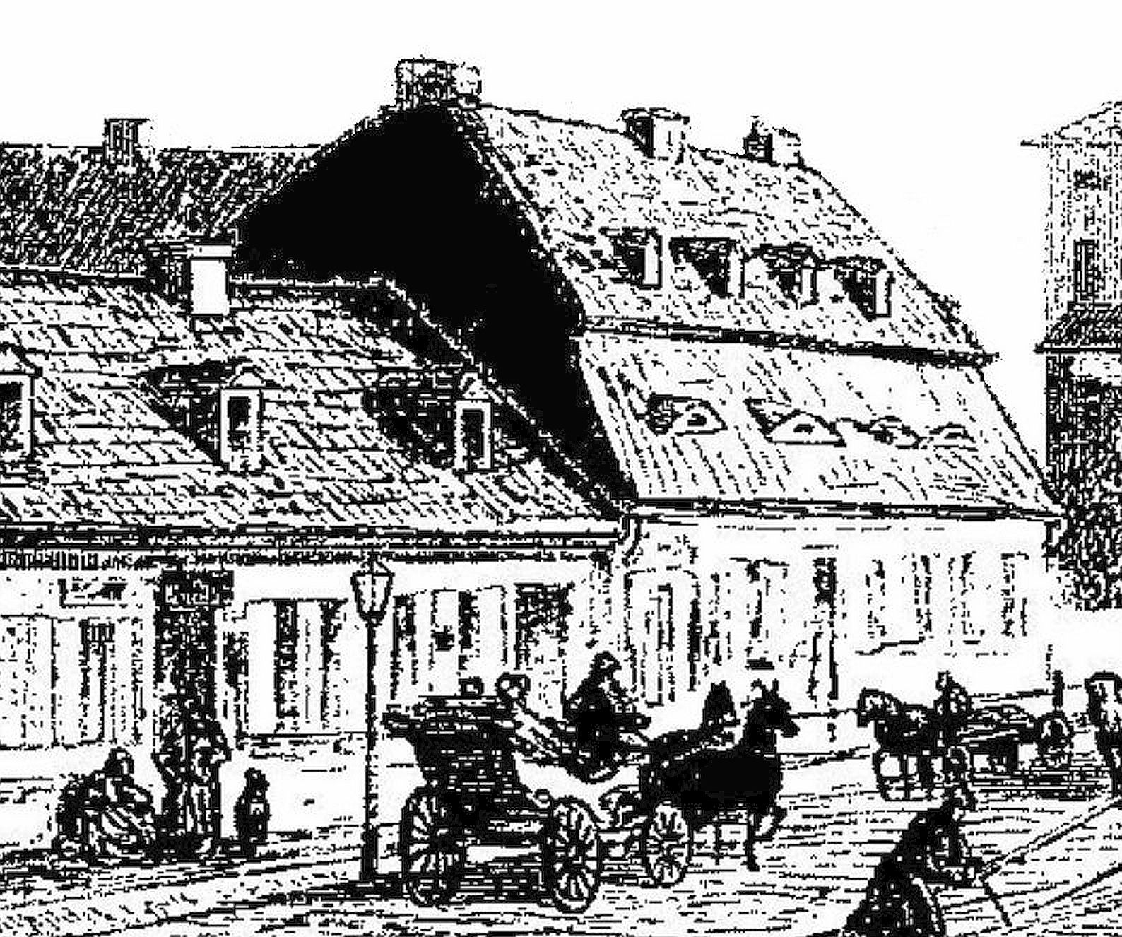 Fragment ryciny autorstwa Wojciecha Gersona